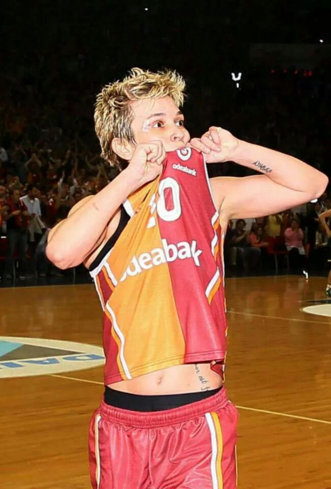 Büyük kaptan Işıl ALBEN Final maçı sonu seyircilere karşı sevinci.